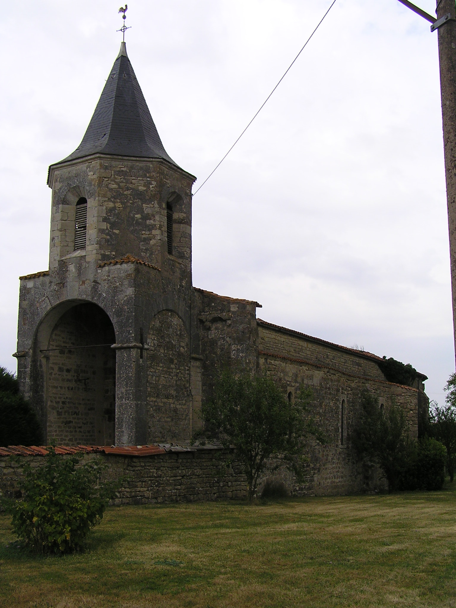 église de Souvigné, Charente, France